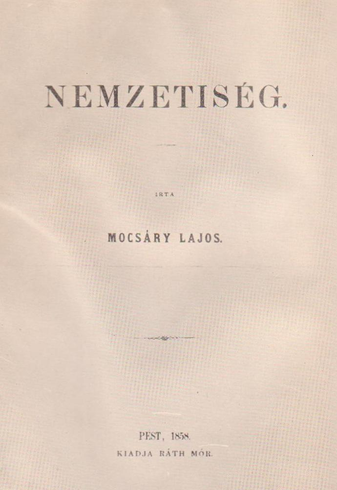 Mocsáry Lajos Nemzetiség című politikai röpiratának címlapja